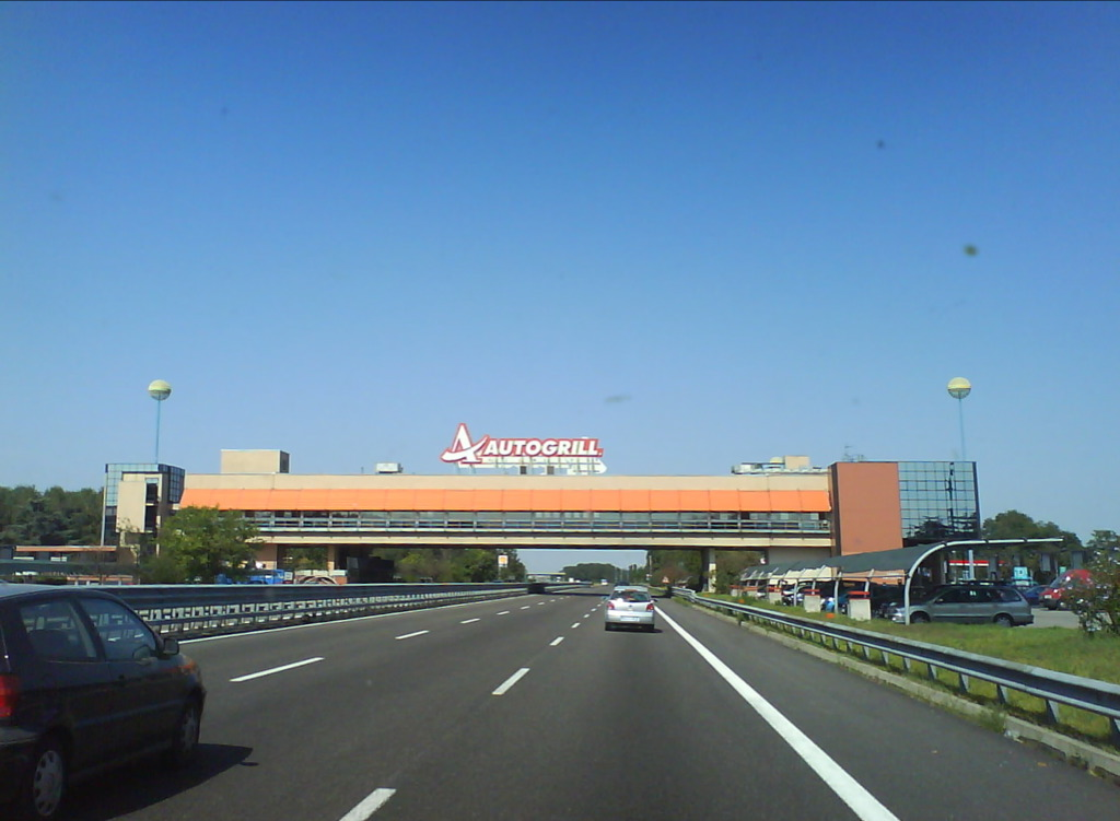 L'Autogrill di Dorno, sull'autostrada A7.